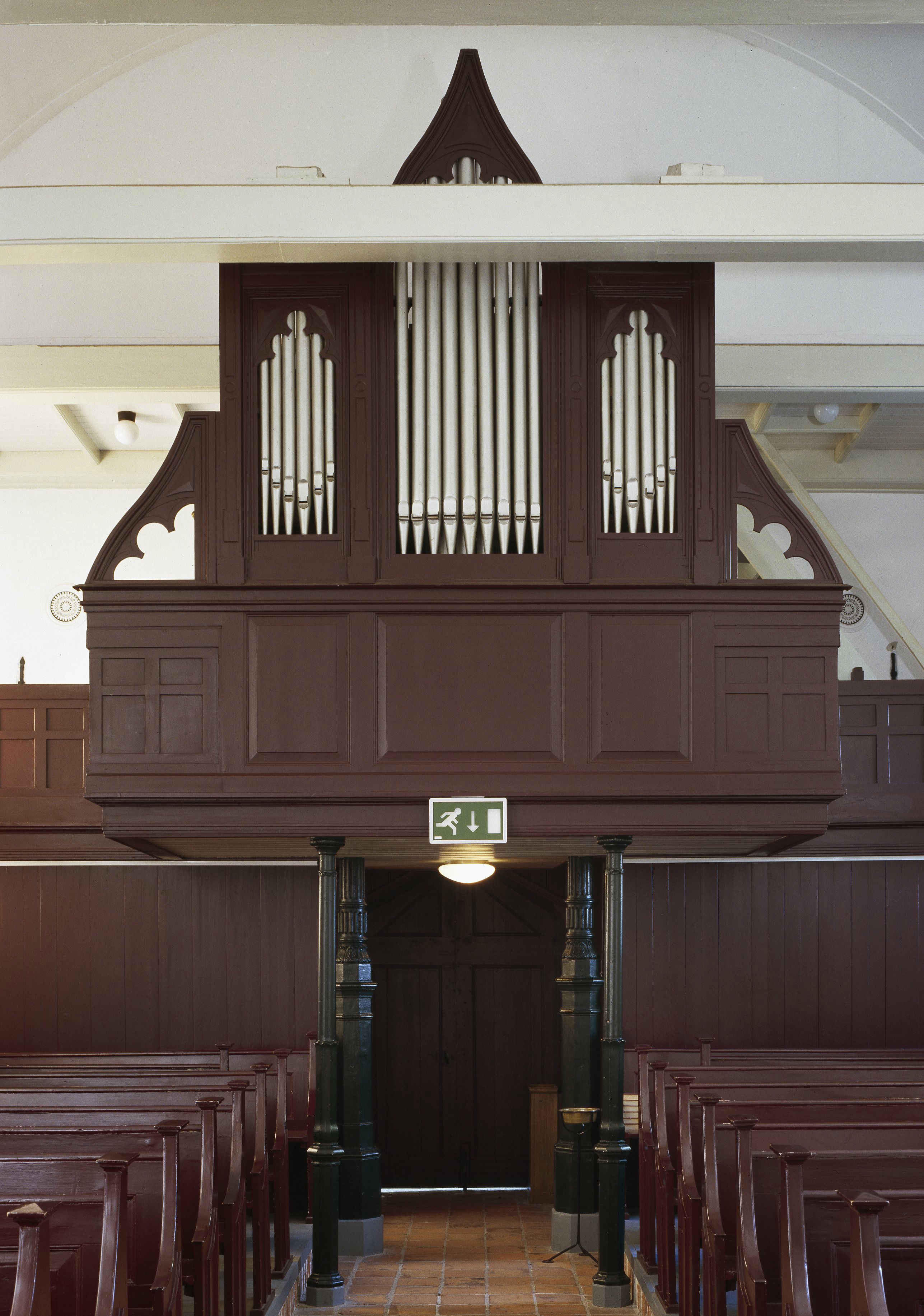 Voormalige Hervormde Kerk: Interieur, aanzicht orgel, orgelnummer 1104 of 2014 (opmerking: Gefotografeerd voor Het Historische Orgel in Nederland 1894-1901, bladzijde 317)